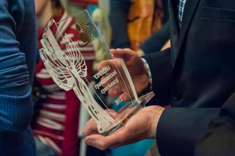 Чэмпіёны грамадзянскай супольнасці. Прэмія Асамблеі НДА